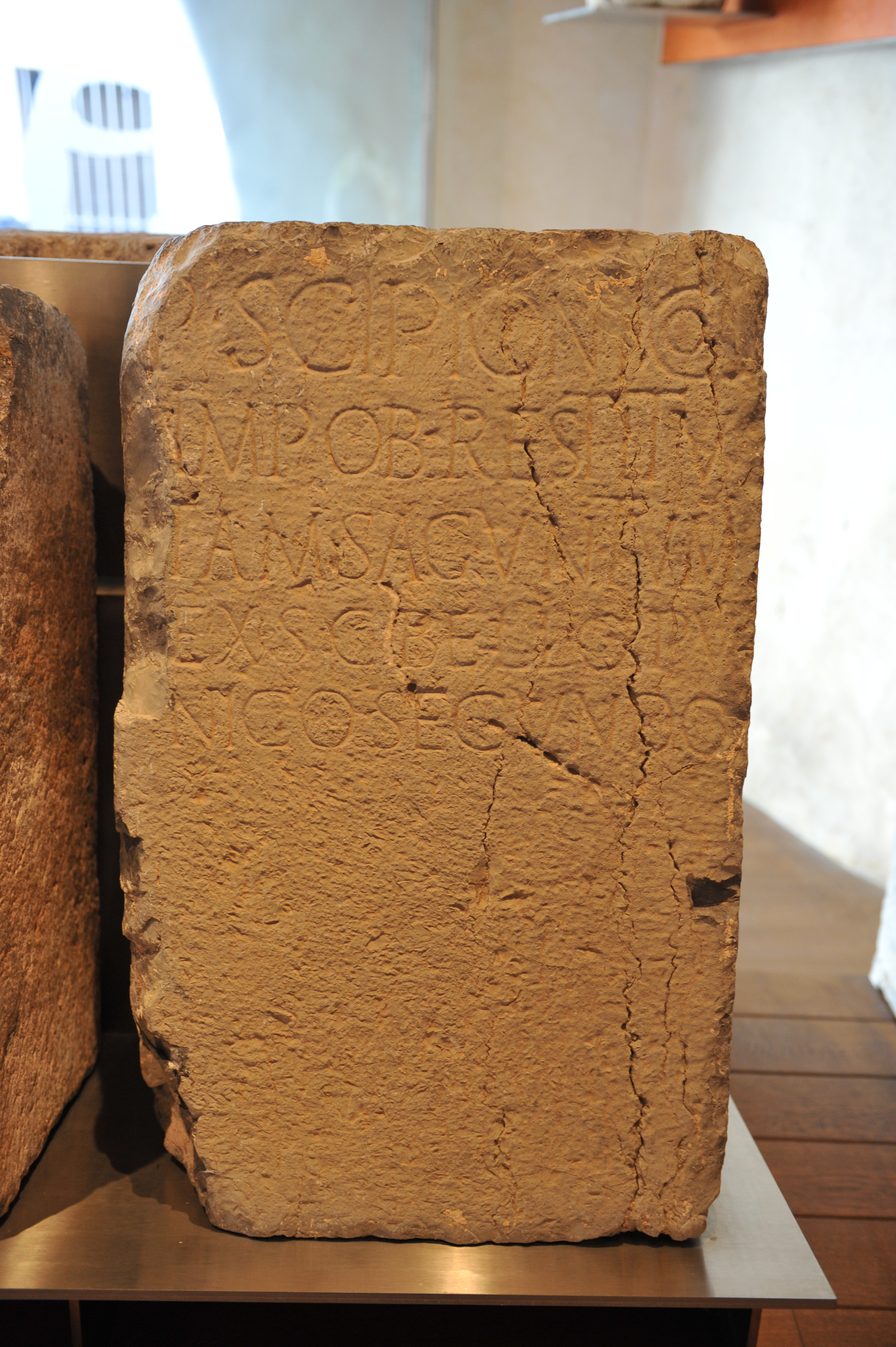 P(ublio) Scipioni co(n)s(uli) / imp(eratori) ob restitu/tam Saguntum / ex s(enatus) c(onsulto) bello Pu/nico secundo - CIL II, 03836